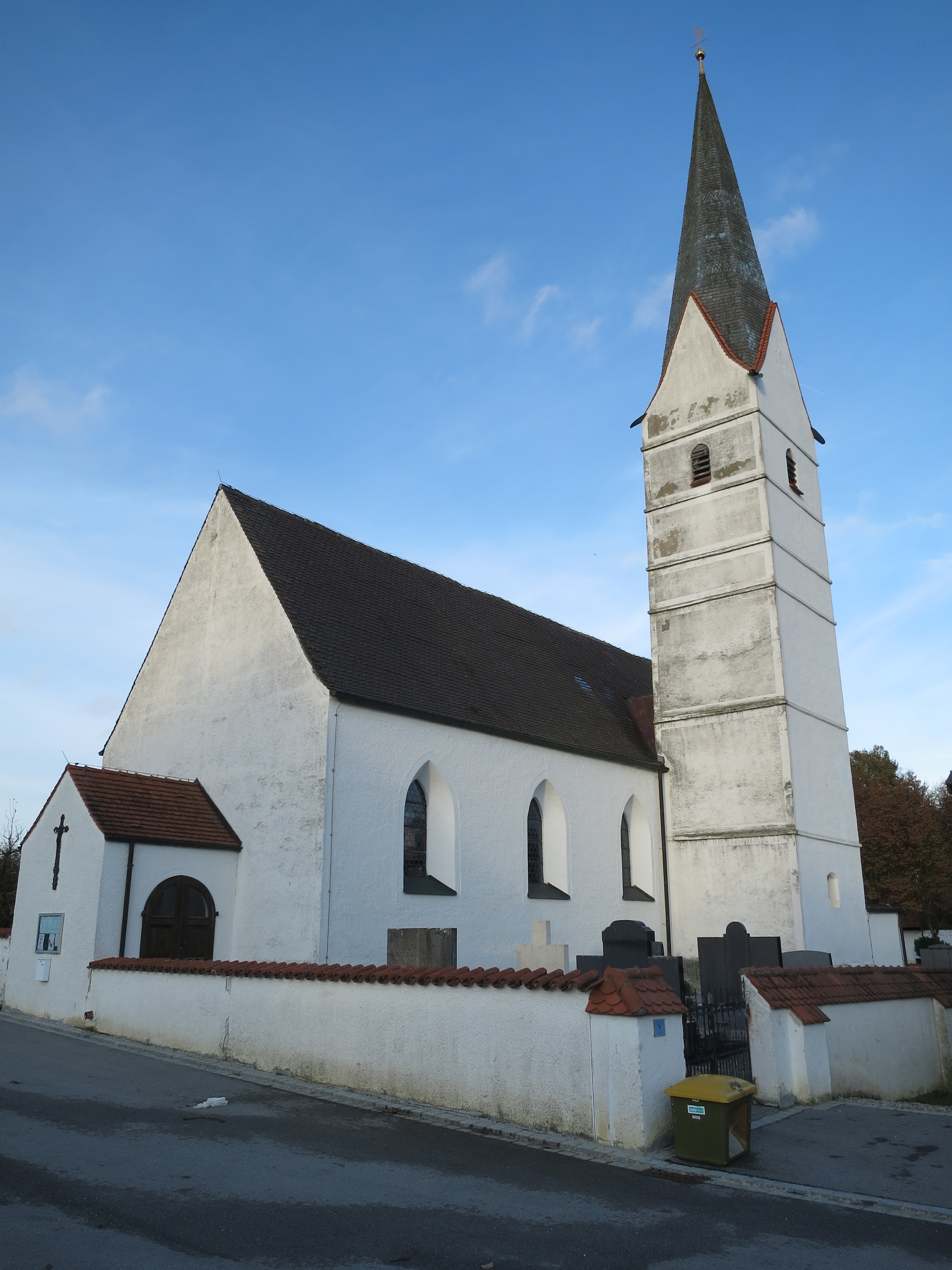 Katholische Filialkirche St. Sixtus Spätgotischer Saalbau mit polygonalem Chorschluss und Flankenturm, 15. Jahrhundert